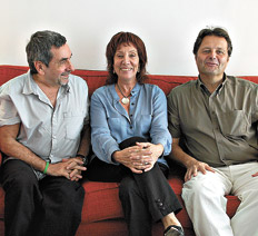 Bernardo Bergeret, Liliana Mazure y Jerome Paillard